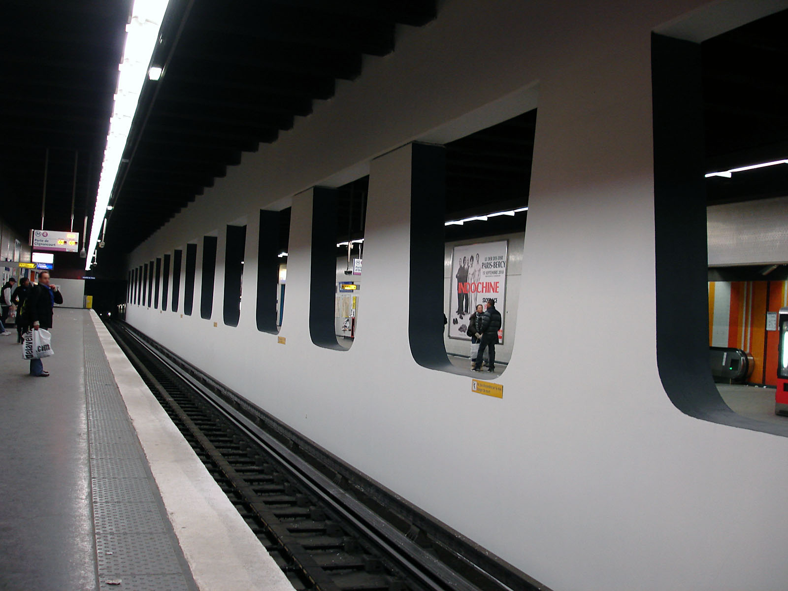 La station Les Halles de la ligne 4 du métro de Paris, France